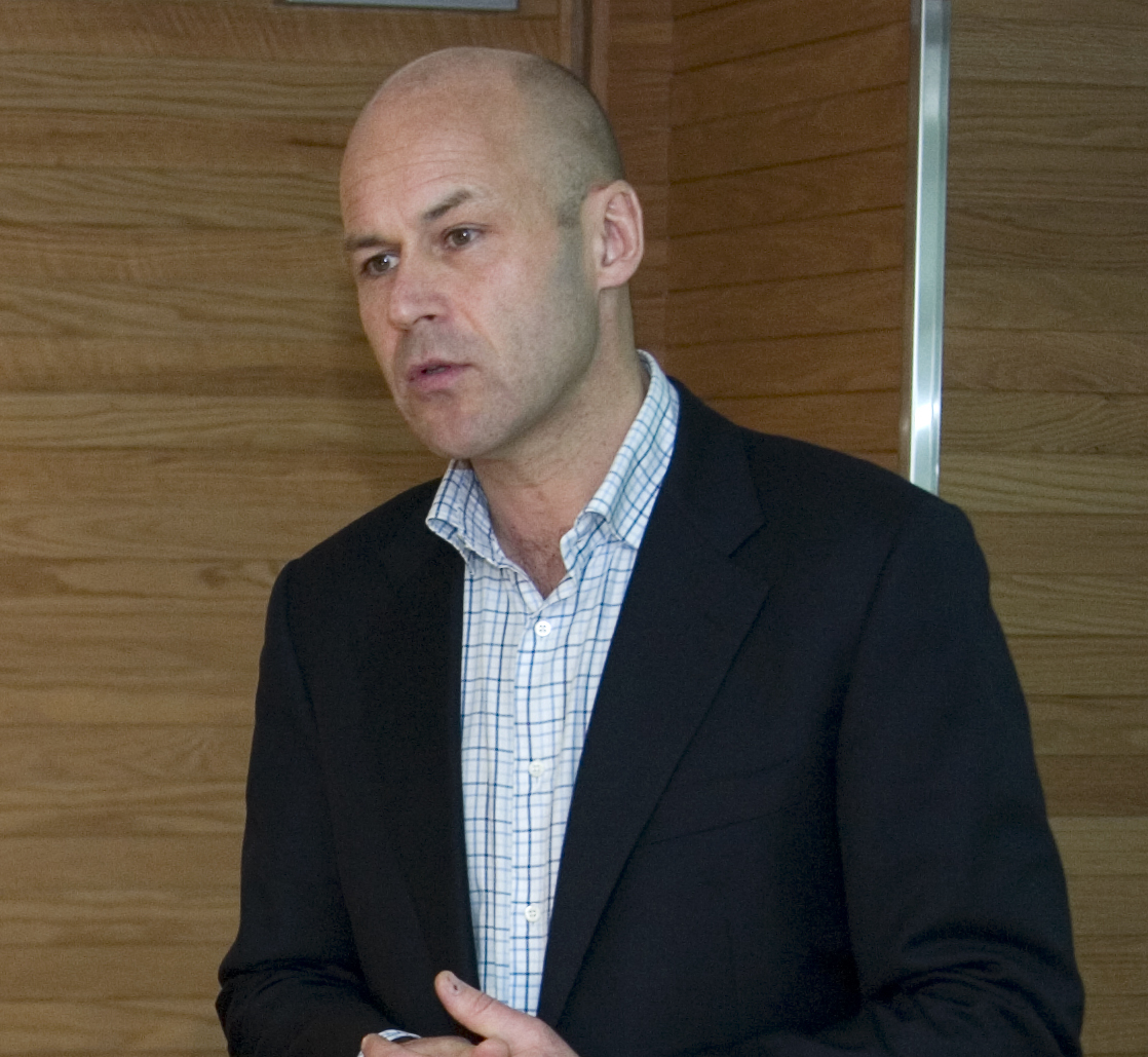 Utvalget som skal vurdere organiseringen av klagesaksbehandlingen p� utlendingsfeltet, presenterte idag en delutredning for for justisminister Knut Storberget. Utvalget foresl�r at departementet f�r utvidet mulighet til � gi generelle instruksar til UNE, slik departementet i dag kan gj�re overfor Utlendingsdirektoratet. Utvalet tilr�der ikke at departementet skal kunne instruere UNE n�r det gjelder vurderingen av asyl.